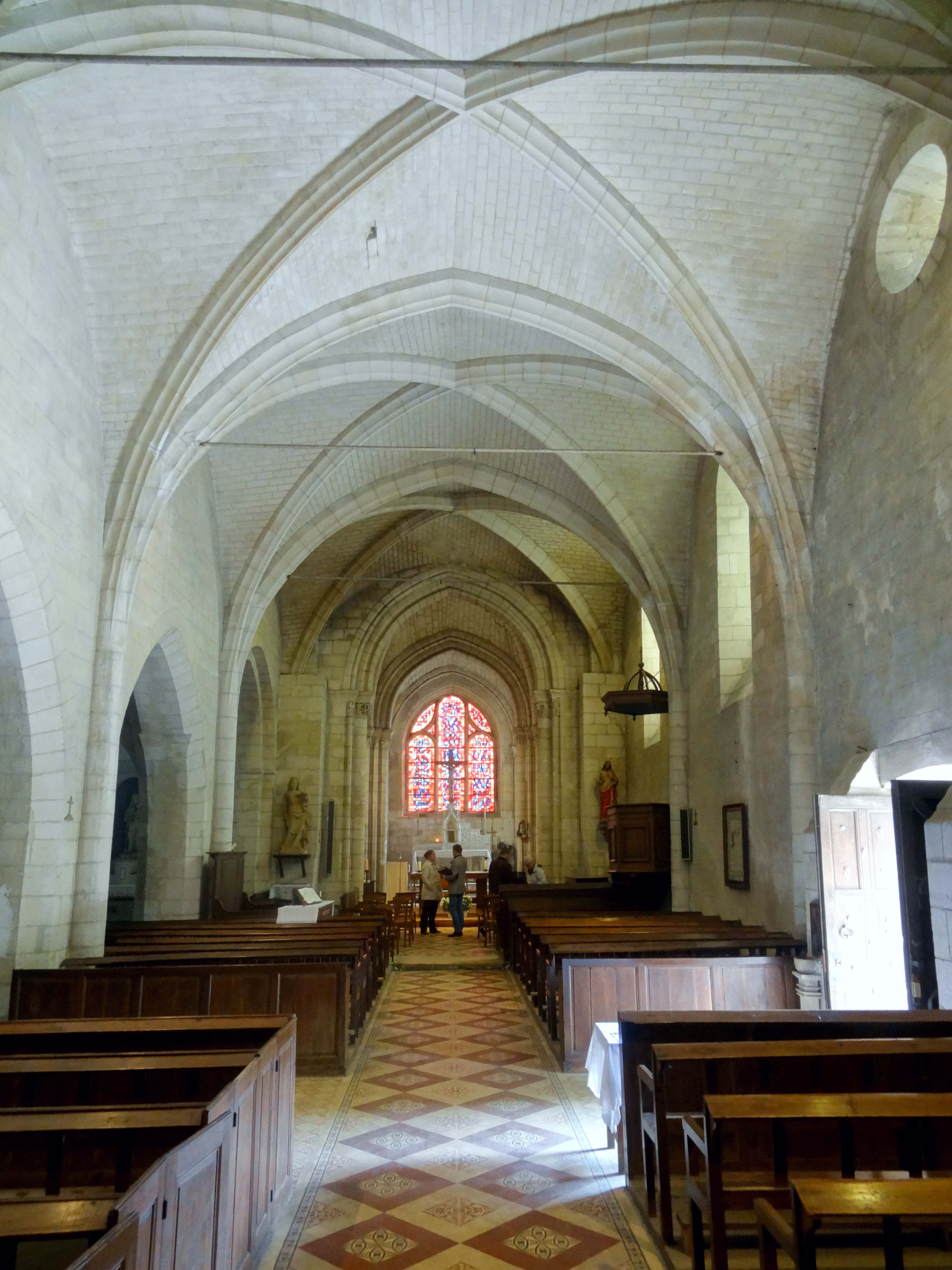 Intérieur de l'église - voir titre.